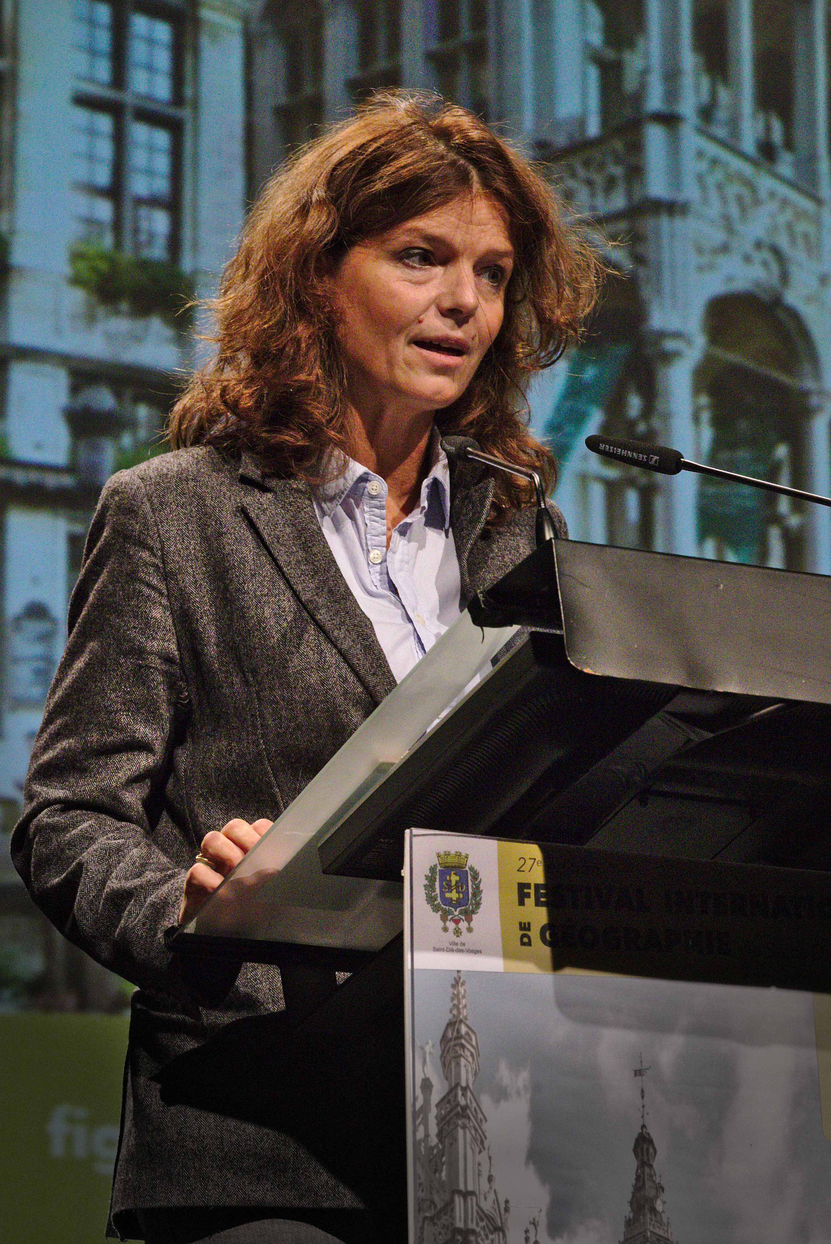 Maylis de Kerangal, grand témoin, lors de la cérémonie de clôture du Festival international de géographie 2016.